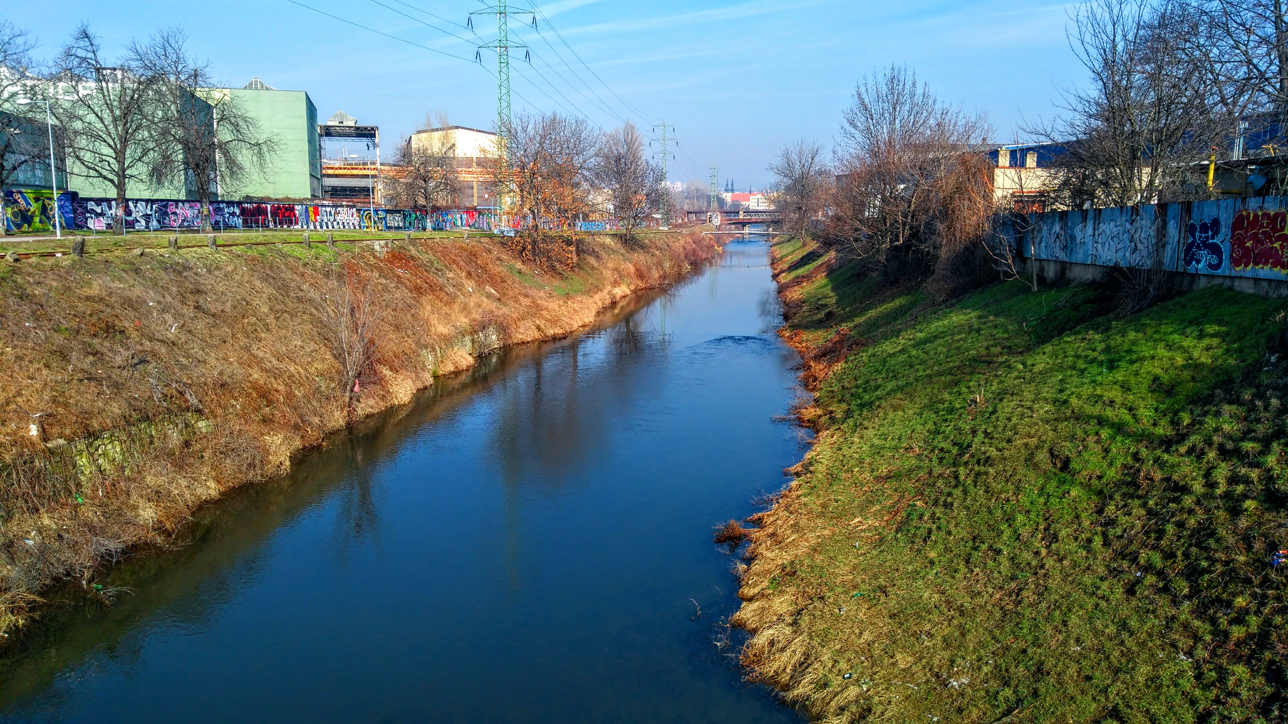 Řeka.